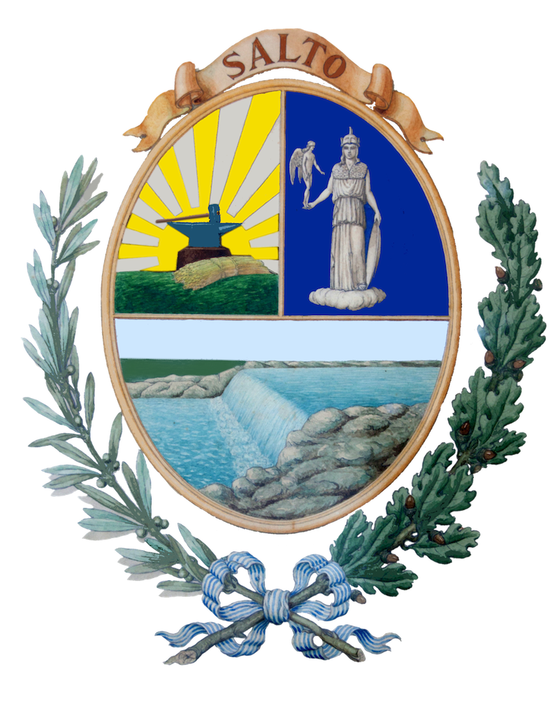 Escudo de la Ciudad de Salto, Imagen oficial usada por la administración de gobierno actual, Trabajo de readecuación de colores sobre imagen de la pintura Original.